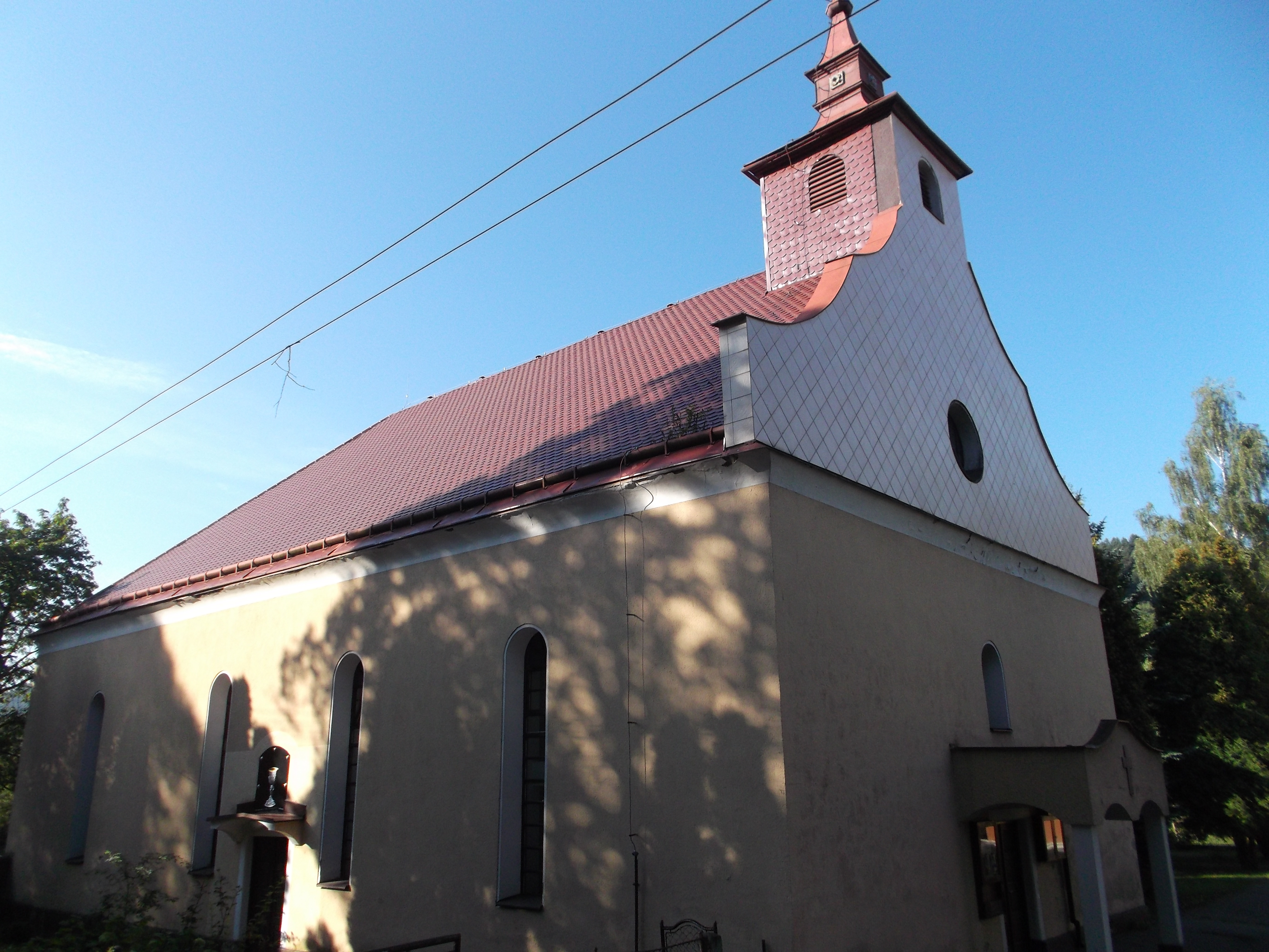 Kostol